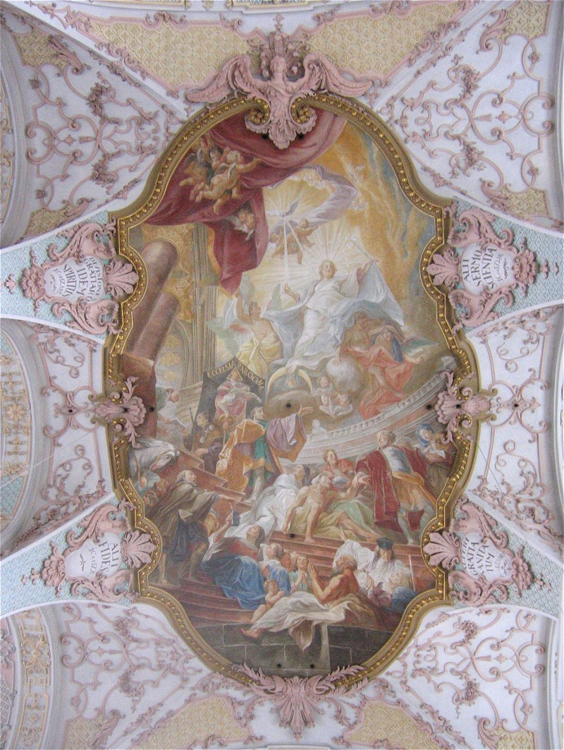 Heilig-Geist-Kirche in Muenchen, Deckenfresko: Gründung des Heilig-Geist-Spitals